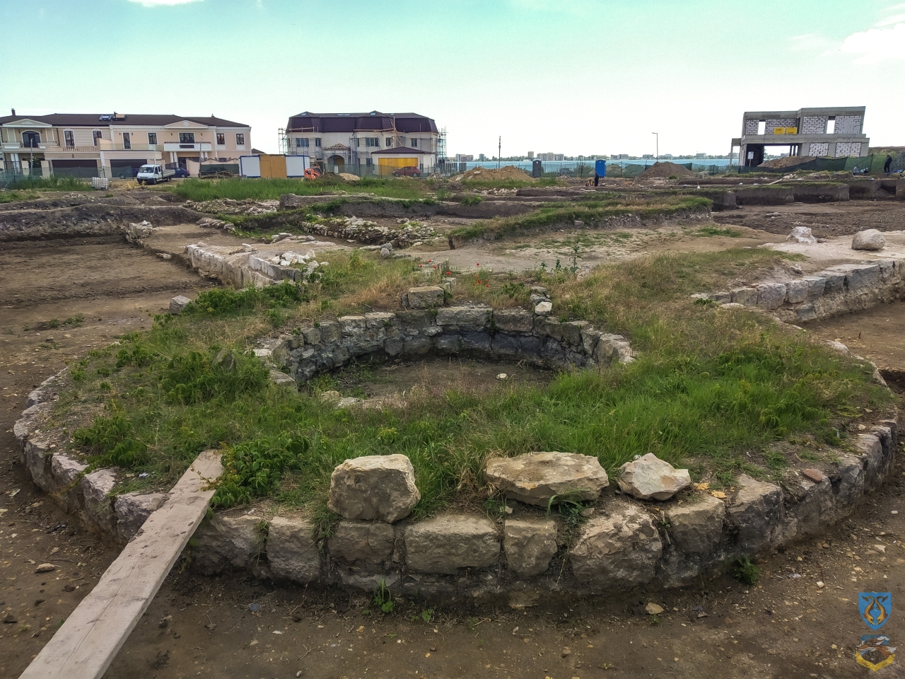 Situl arheologic de la Ovidiu